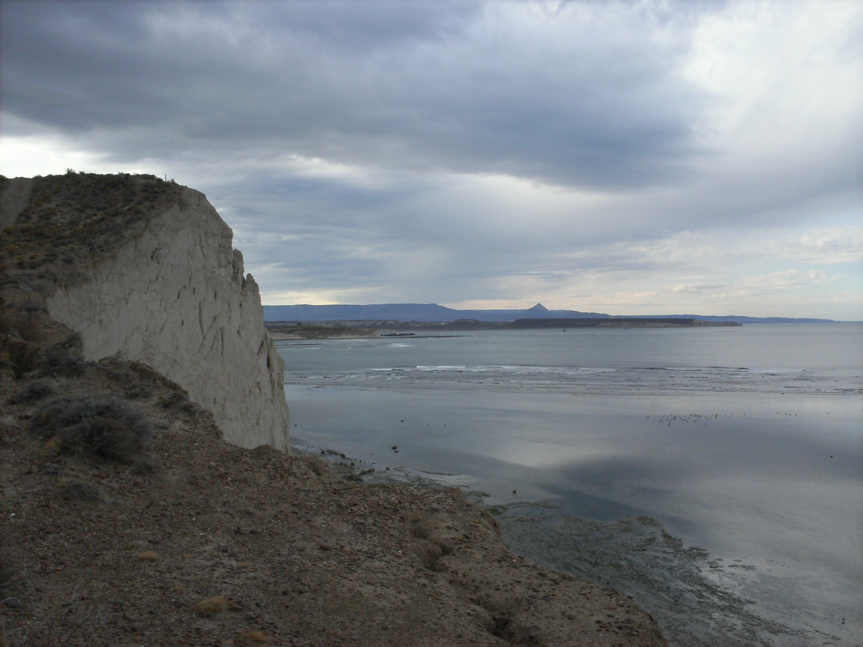 el salanca desde la costa